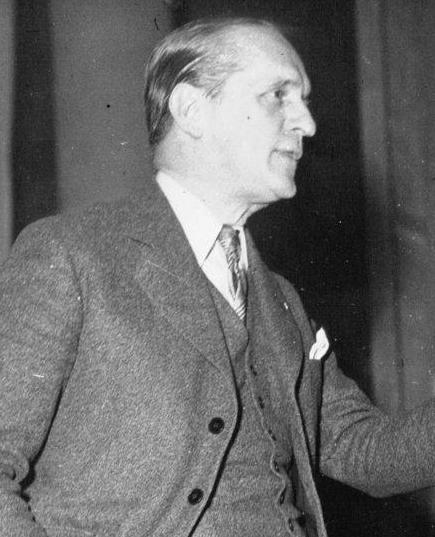 1er Congrès du Parti social français : le colonel de La Rocque au micro : [photographie de presse] / Agence Meurisse